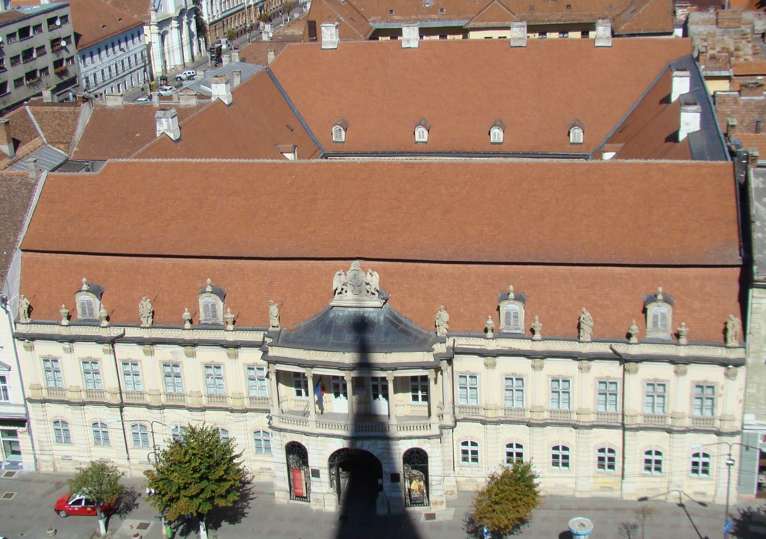 Palatul Banffy, azi Muzeul de Artă